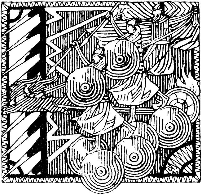 Gerhard Munthe: Illustration for Olav Tryggvasons saga. Snorre 1899-edition. «Uværet, Hjørungavåg»